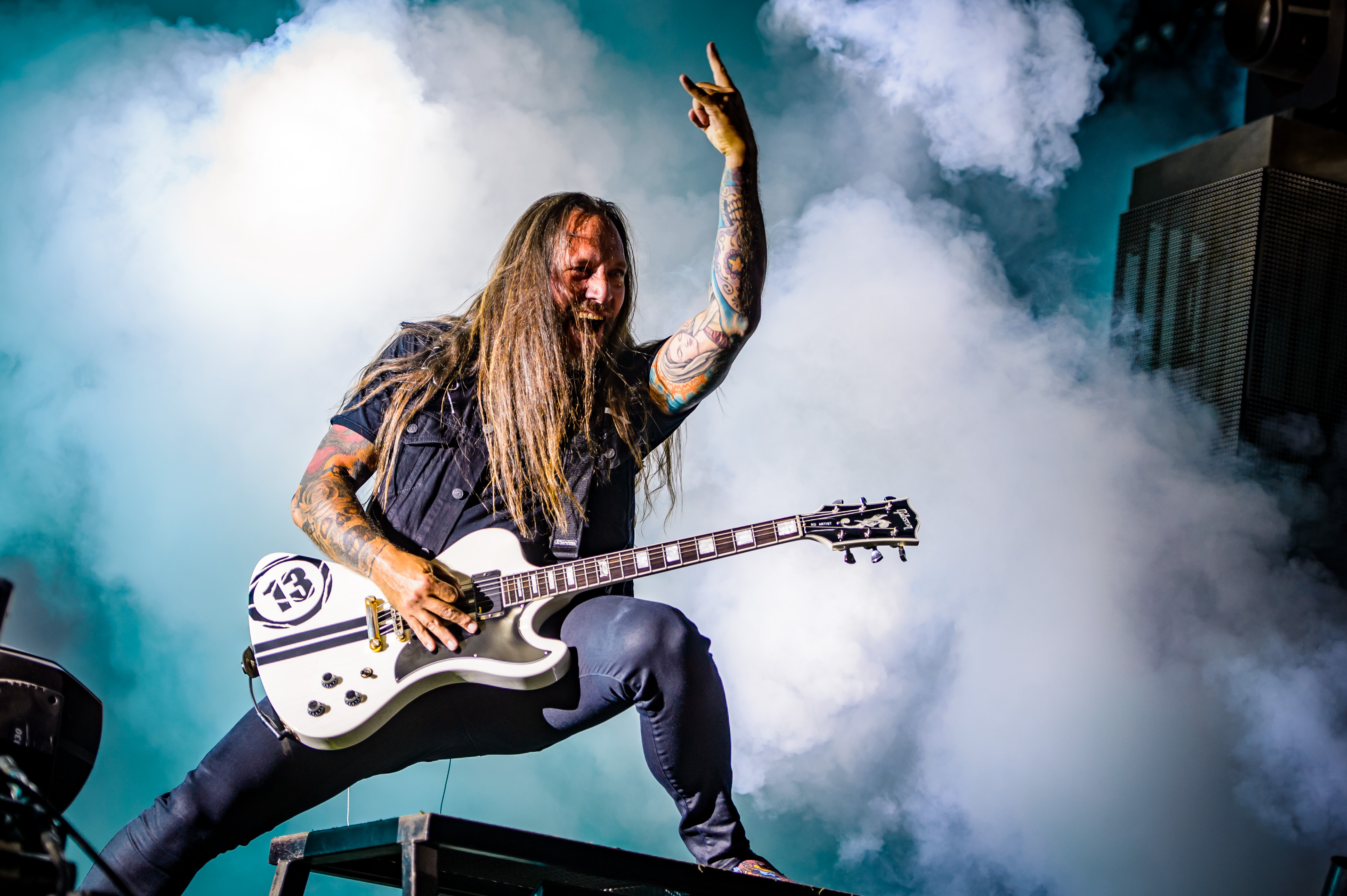 'Wacken Open Air 2018': 'In Flames'